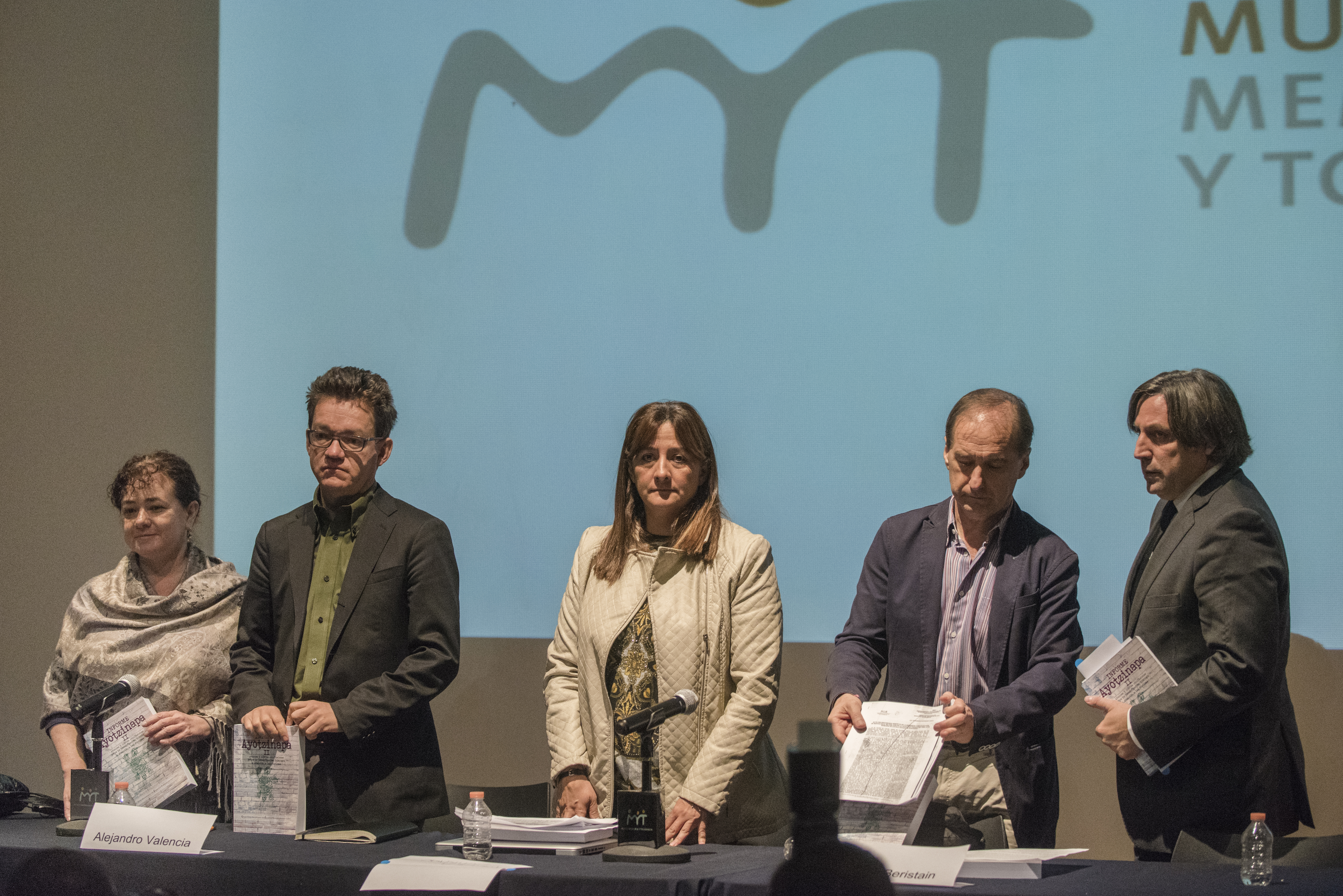 El Museo de la Memoria y Tolerancia, en la Ciudad de México, acogió al GIEI para una conferencia de prensa. El Grupo Interdisciplinario de Expertos Independientes (GIEI) es un comité de juristas y médicos enfocados en realizar una investigación paralela sobre los acontecimientos ocurridos la noche del 26 y madrugada del 27 de septiembre de 2014 en la comunidad de Iguala (Guerrero), donde jóvenes estudiantes fueron agredidos y desaparecidos.